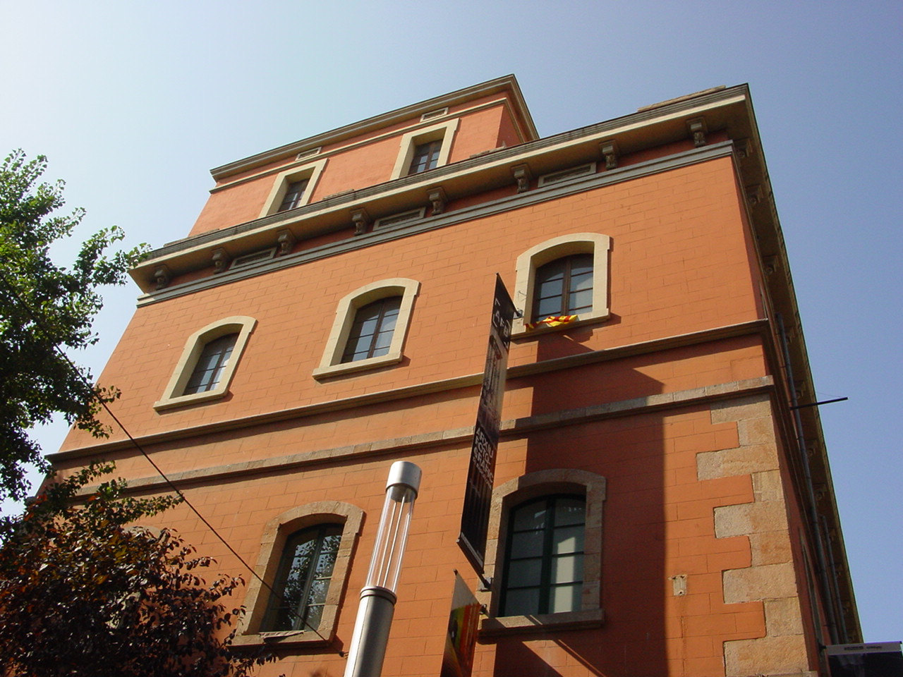 Arxiu Fotogràfic de Barcelona